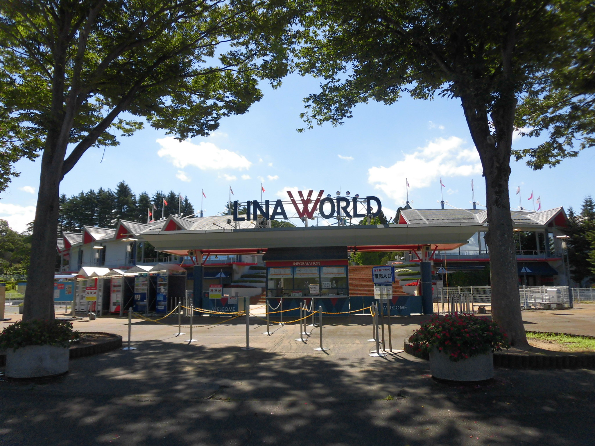 リナワールド。山形県上山市に所在する遊園地。 正門の様子。